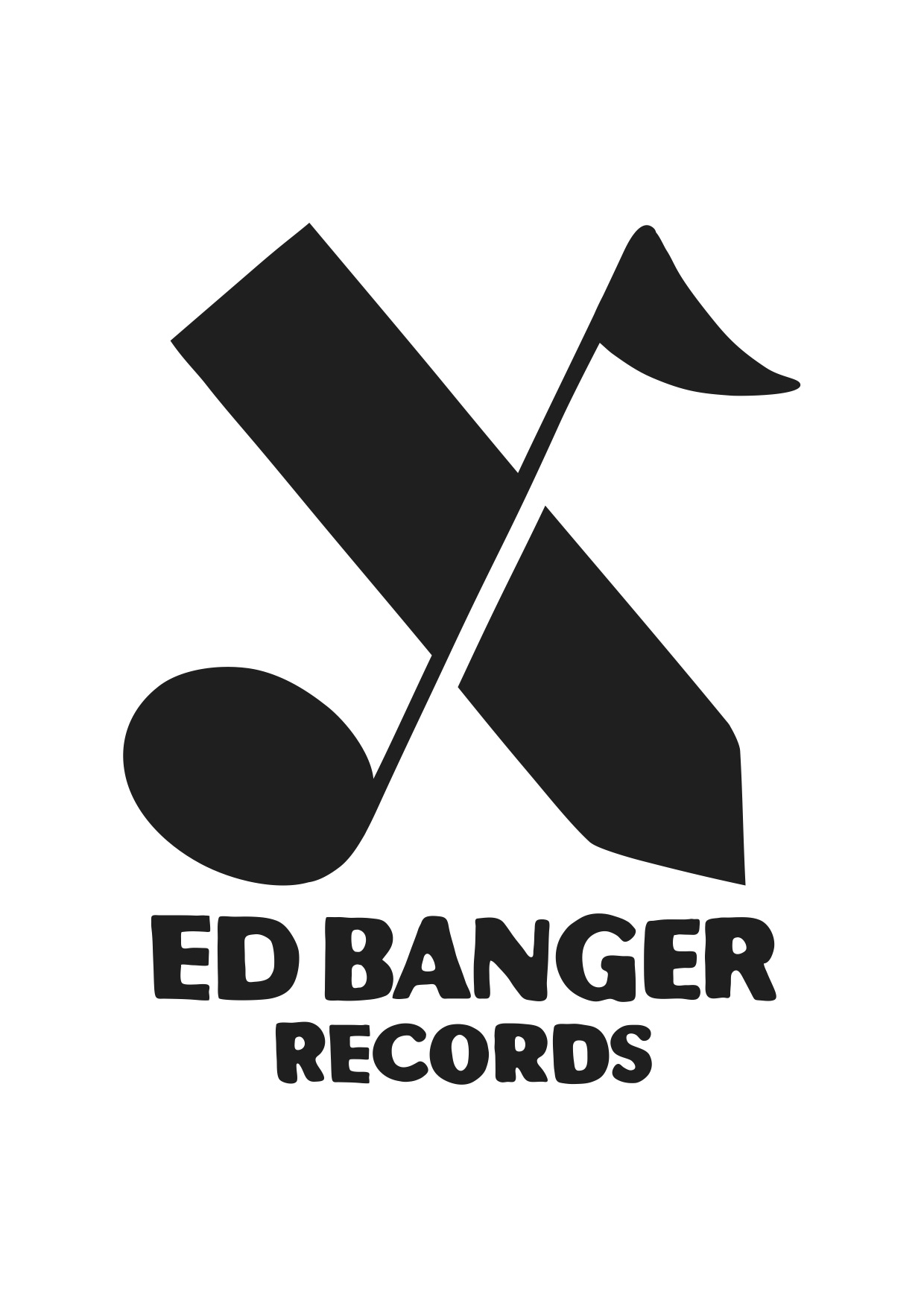 Logo de Ed Banger Records